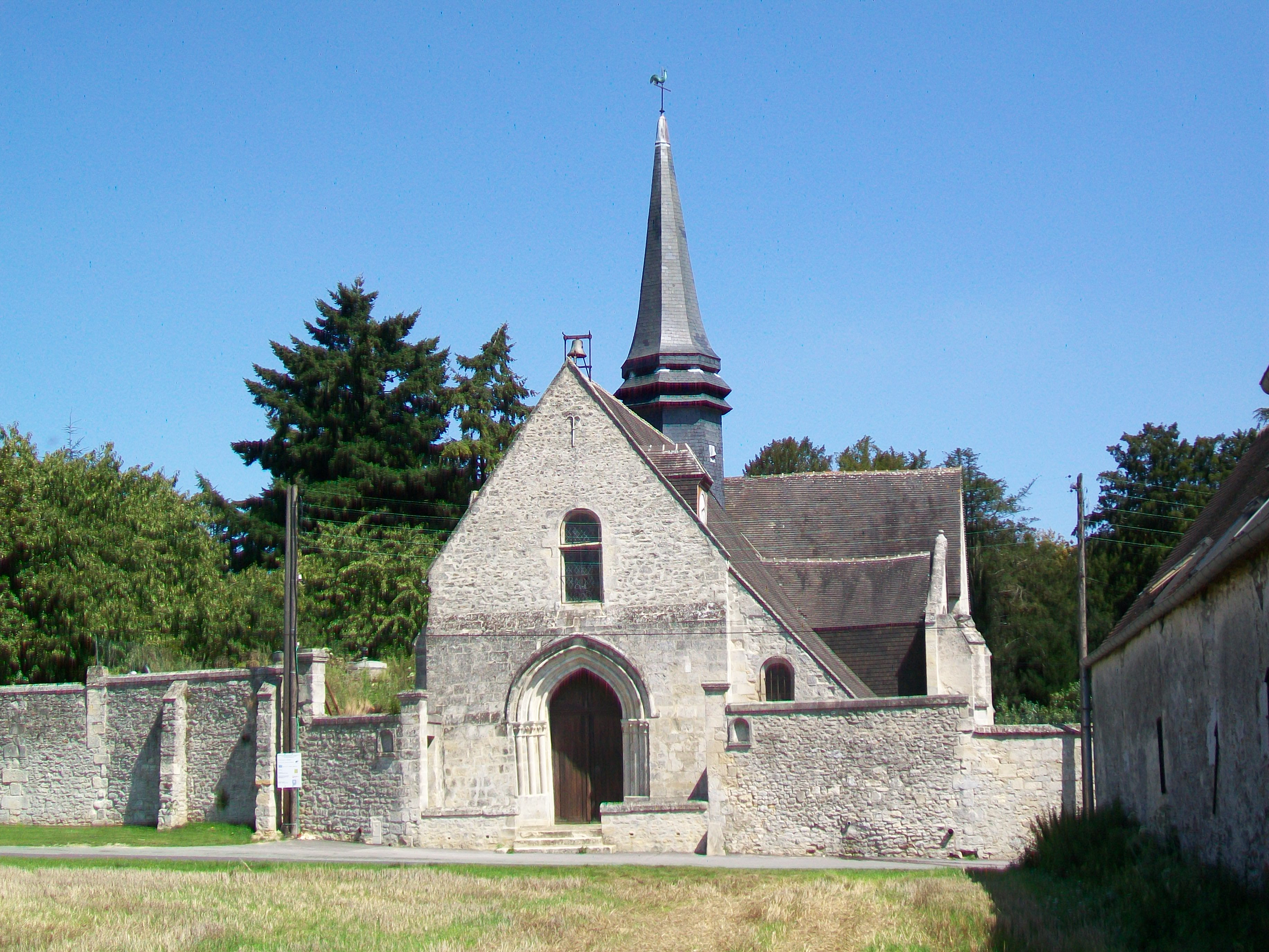 L'église Saint-Pierre, rue Charles-de-la-Bédoyère.